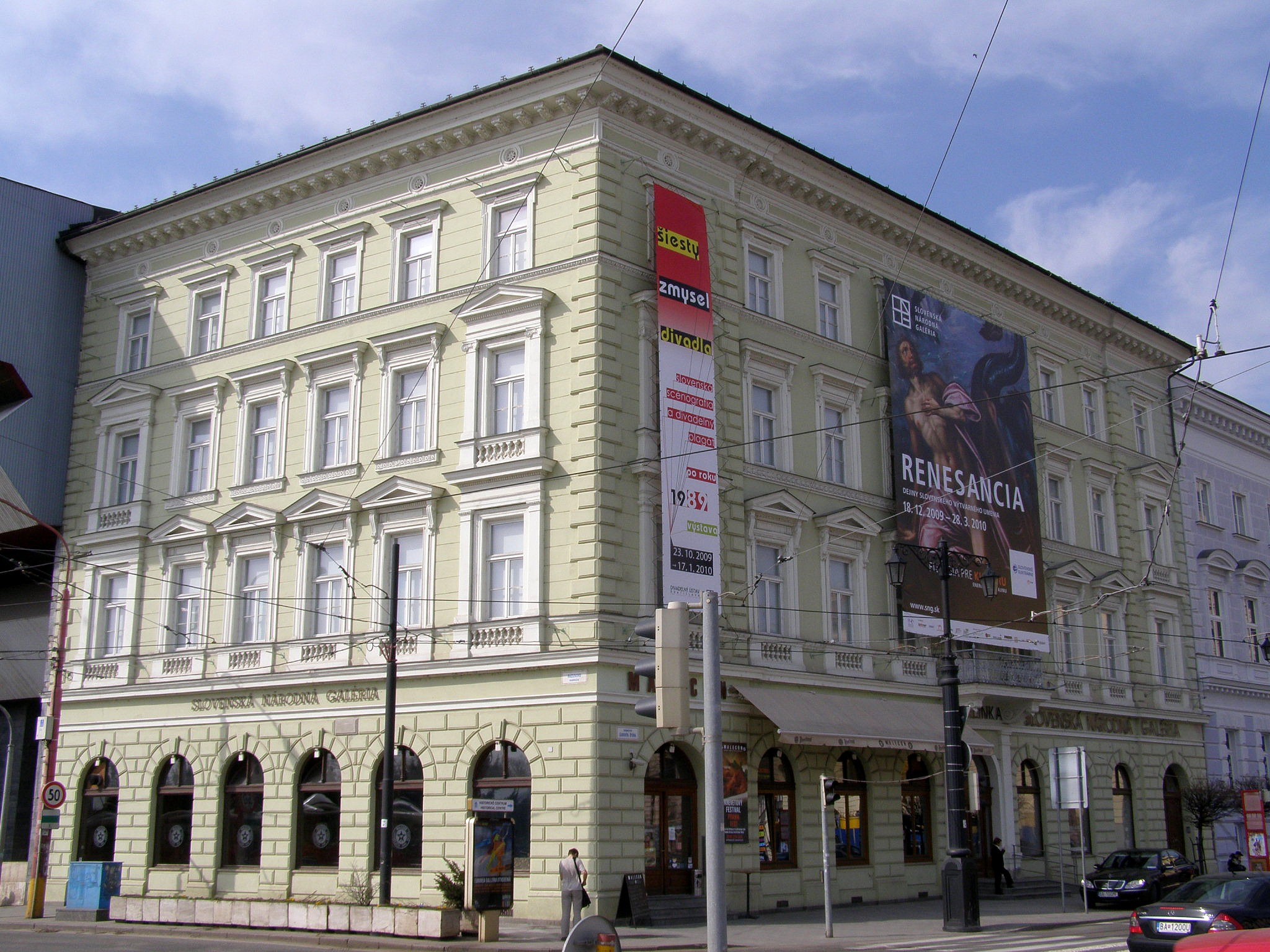 Budova niekdajšieho Esterházyho paláca z druhej polovice 19. storočia je od roku 1990 súčasťou SNG v Bratislave